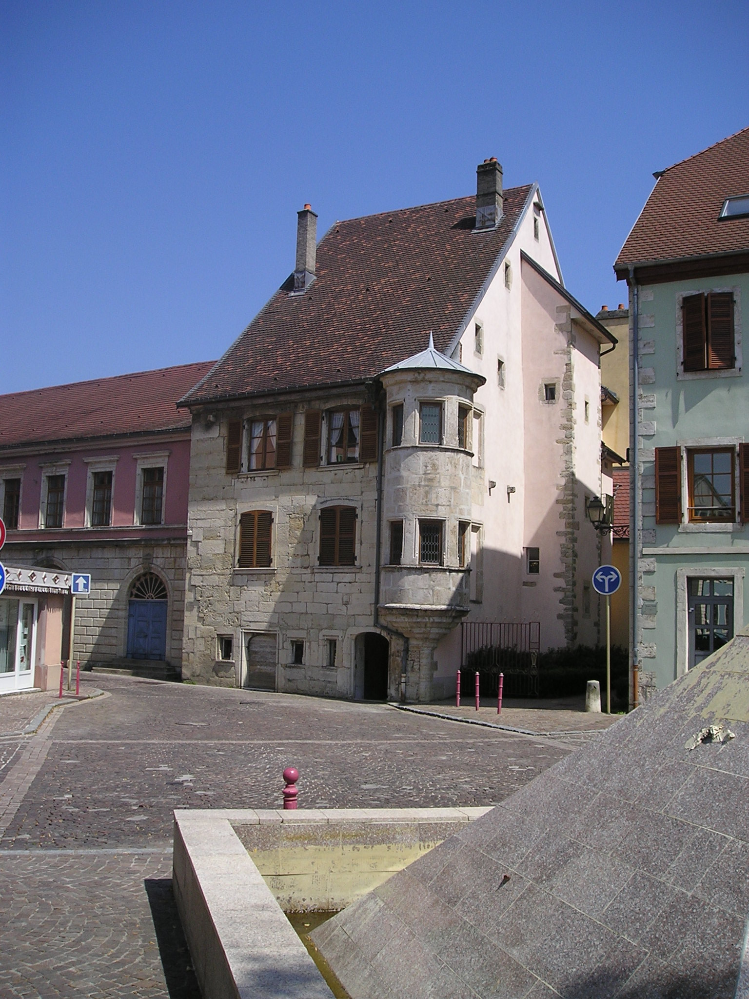 Delle Frankreich Mittelalterliches Haus